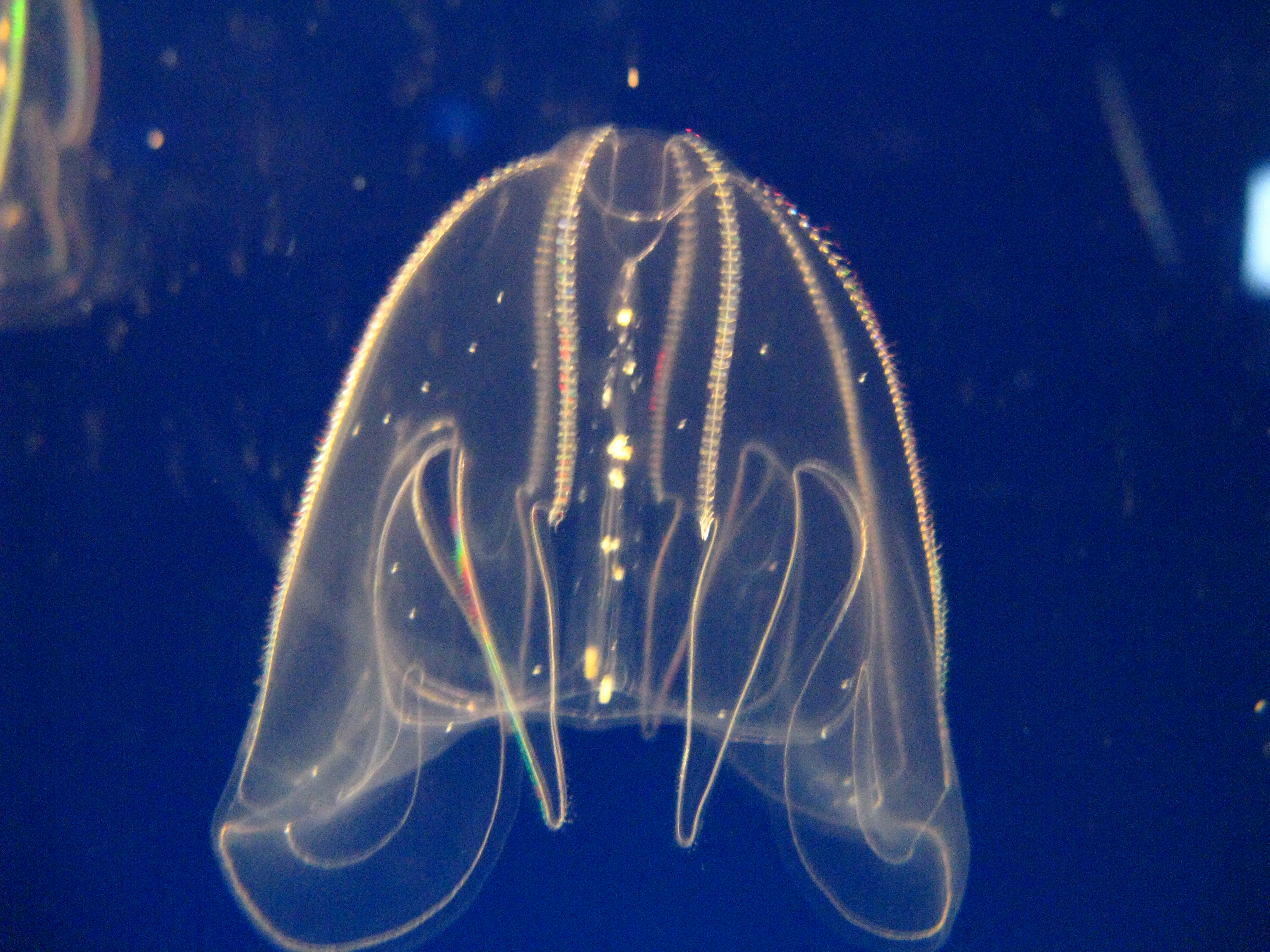 Scientific name Bolinopsis mikado